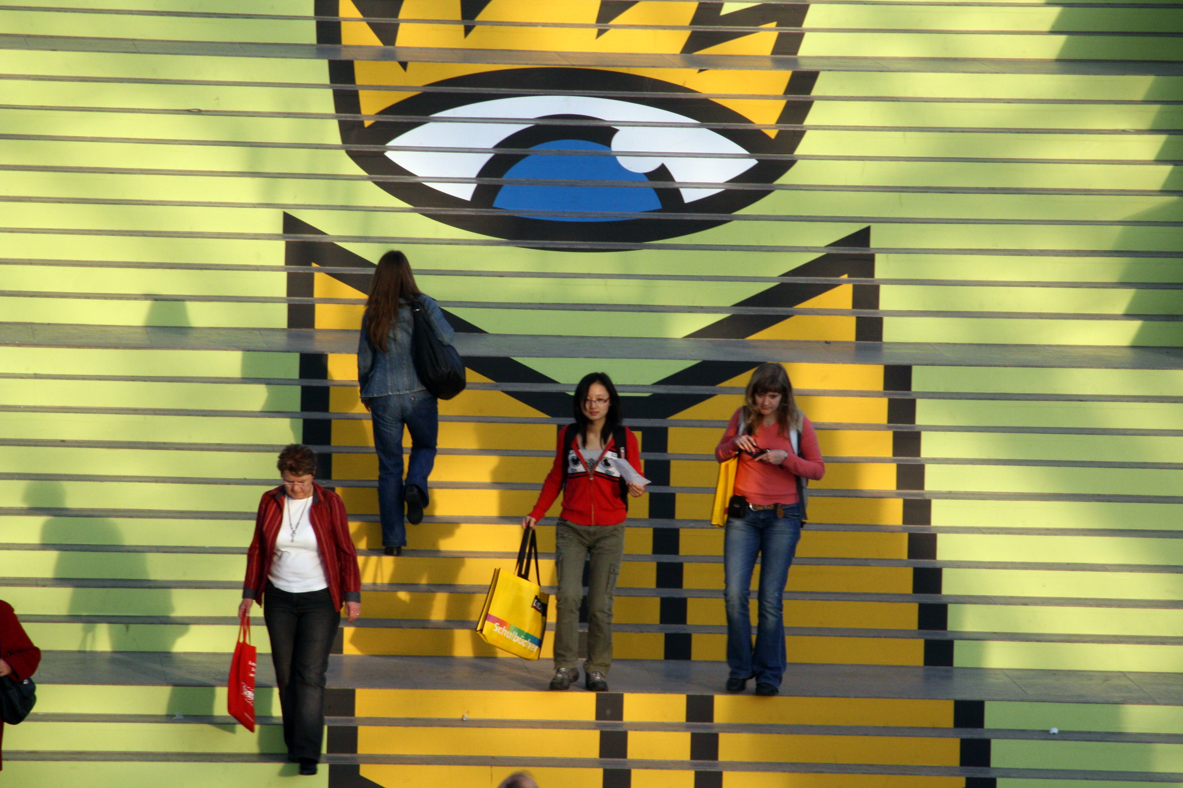 Coloured stairs at Leipziger Buchmesse